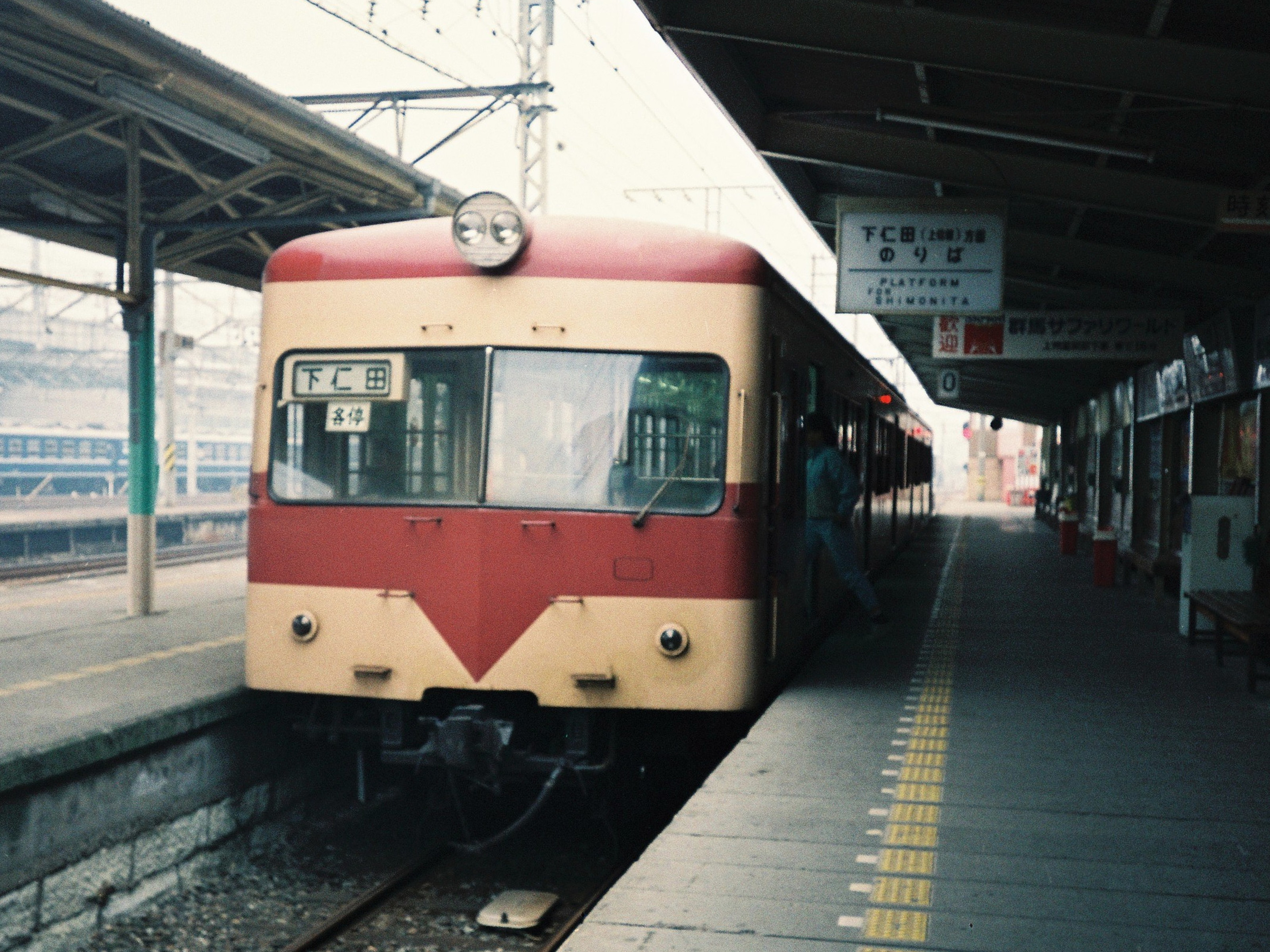 上信電鉄100形105編成。1986年12月14日高崎駅にて撮影。